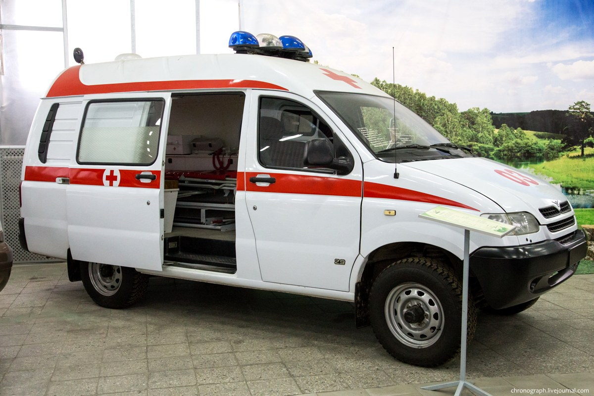 УАЗ-27722 Скорая помощь. Выставочный павильон-музей УАЗа.